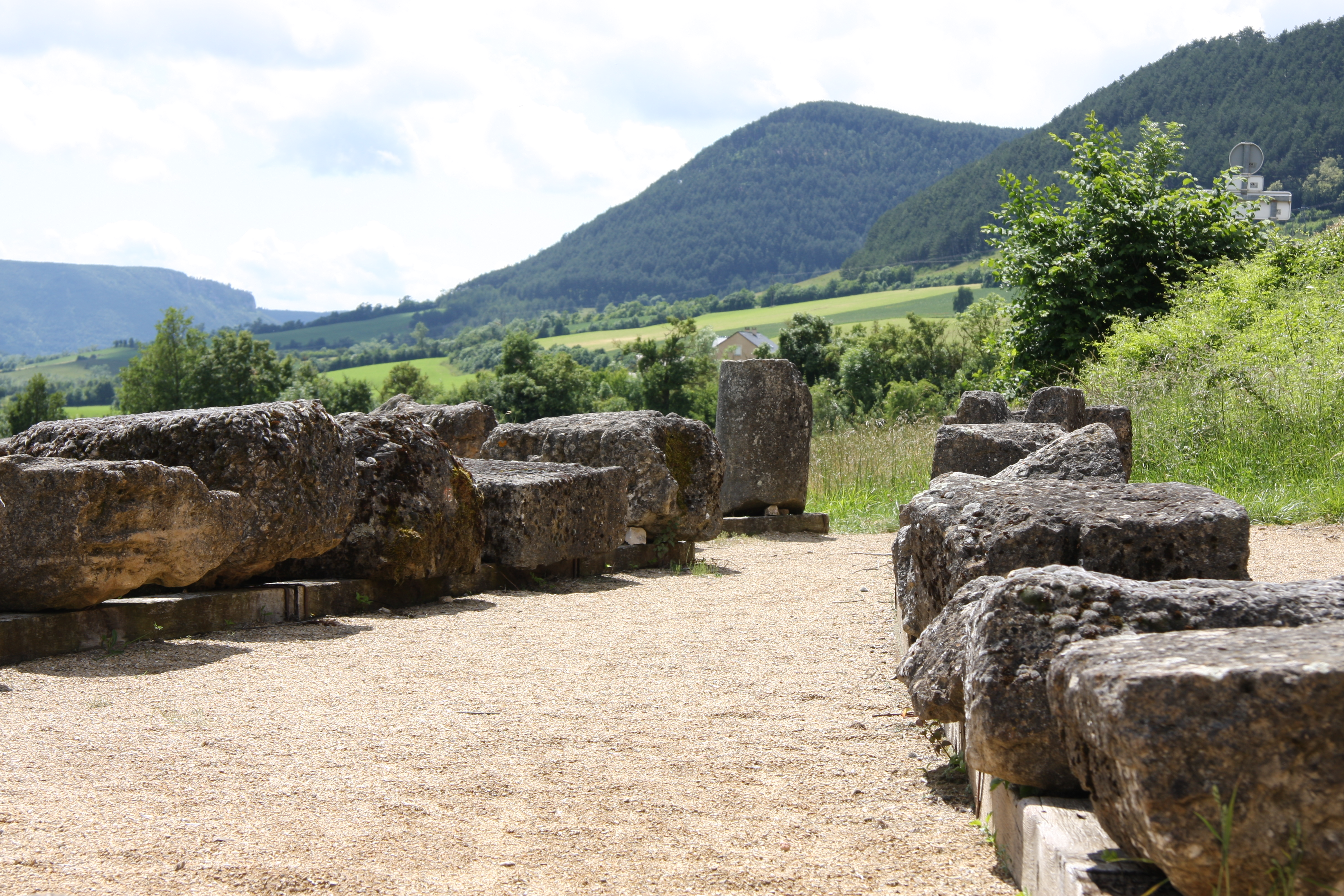 Vestiges du mausolée gallo-romain de Lanuéjols en Lozère (France)